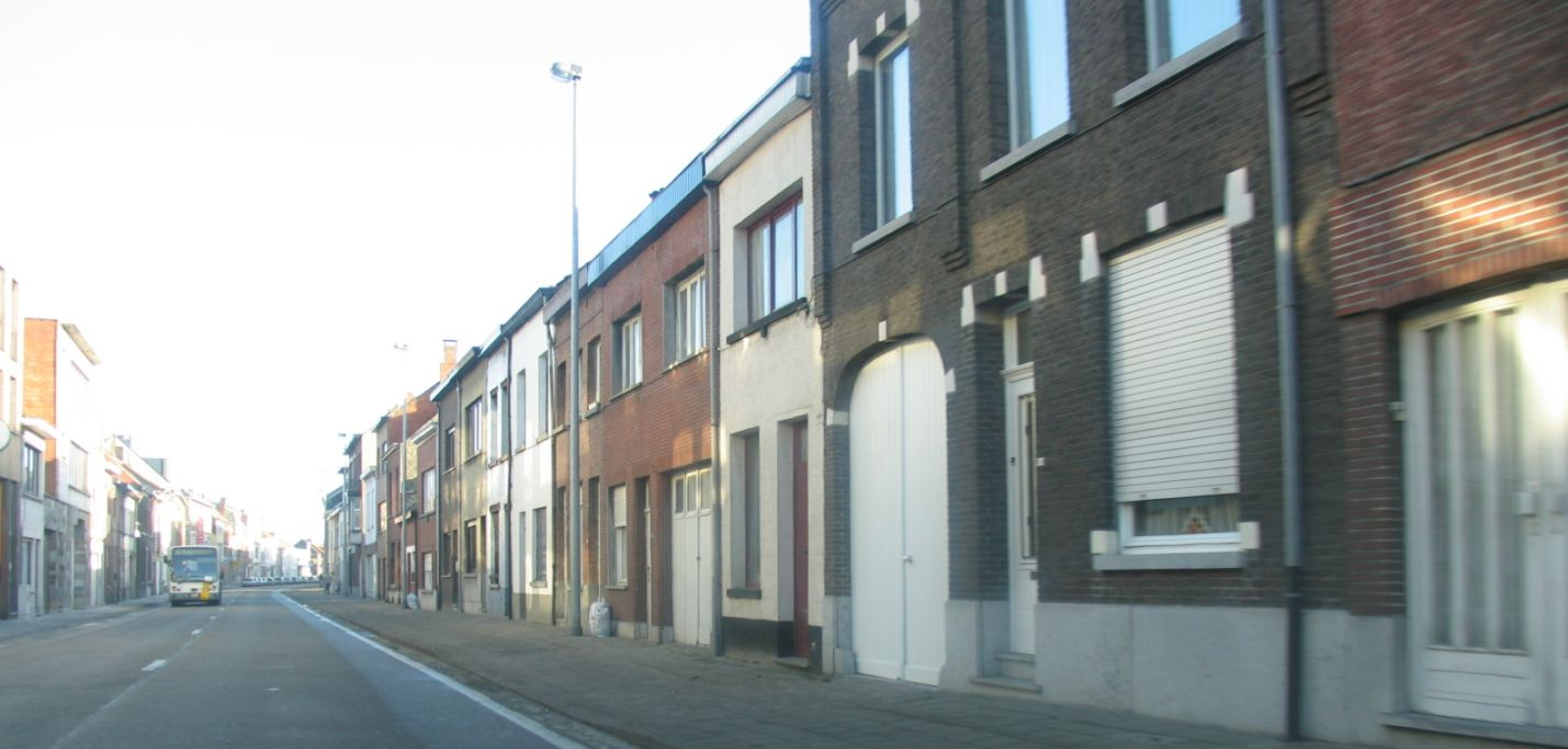 Mechelen, Nekkerspoelstraat richting Putte. Foto Marc Alcide, 25 december 2005